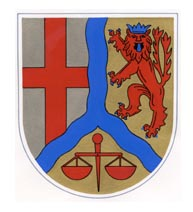 Wappen von Hausbay